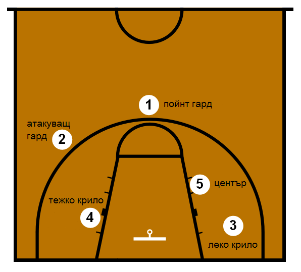 Позиции в баскетбола